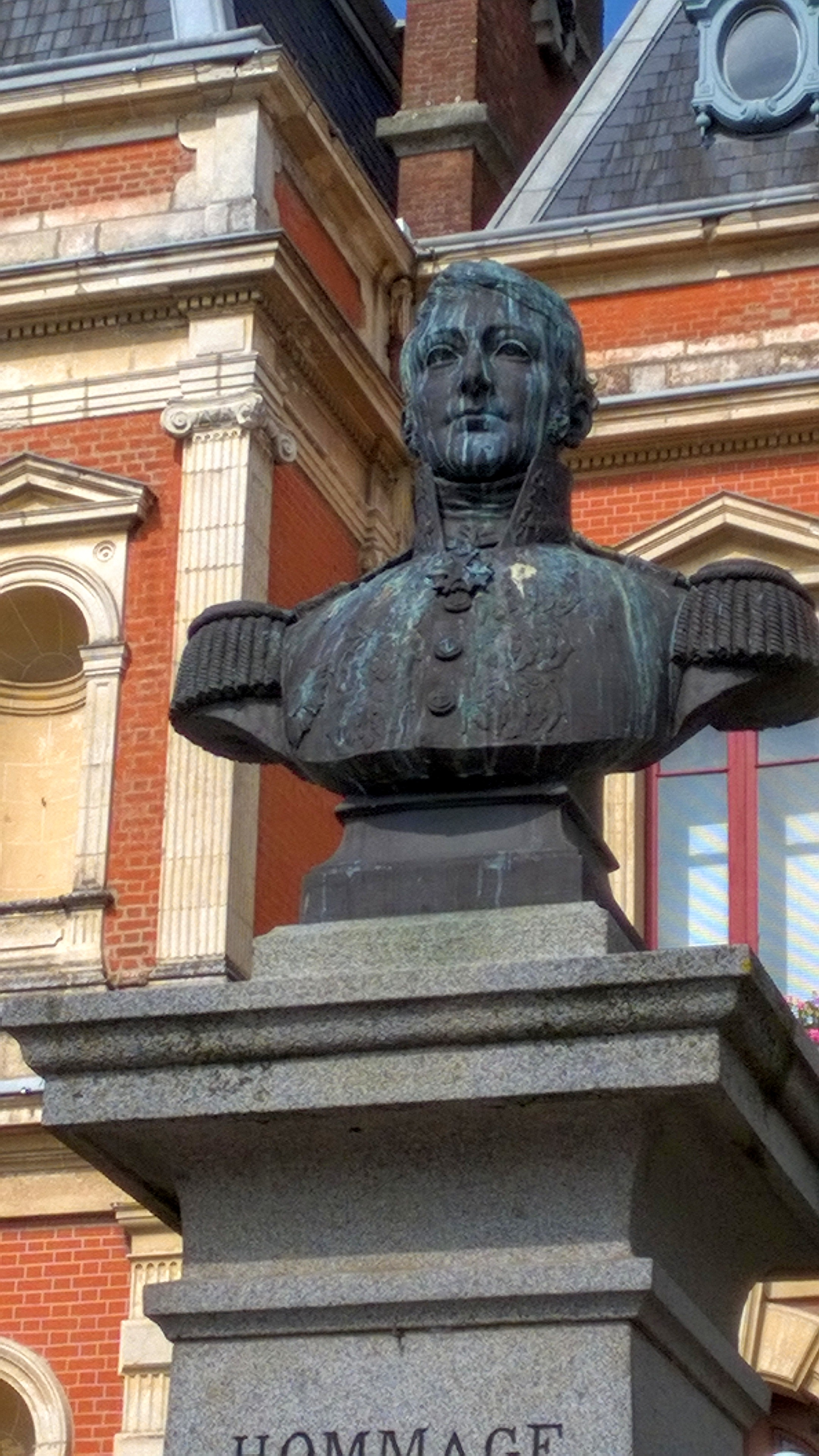 Photo de la statue de l'amiral Bouvet a Saint-Servan